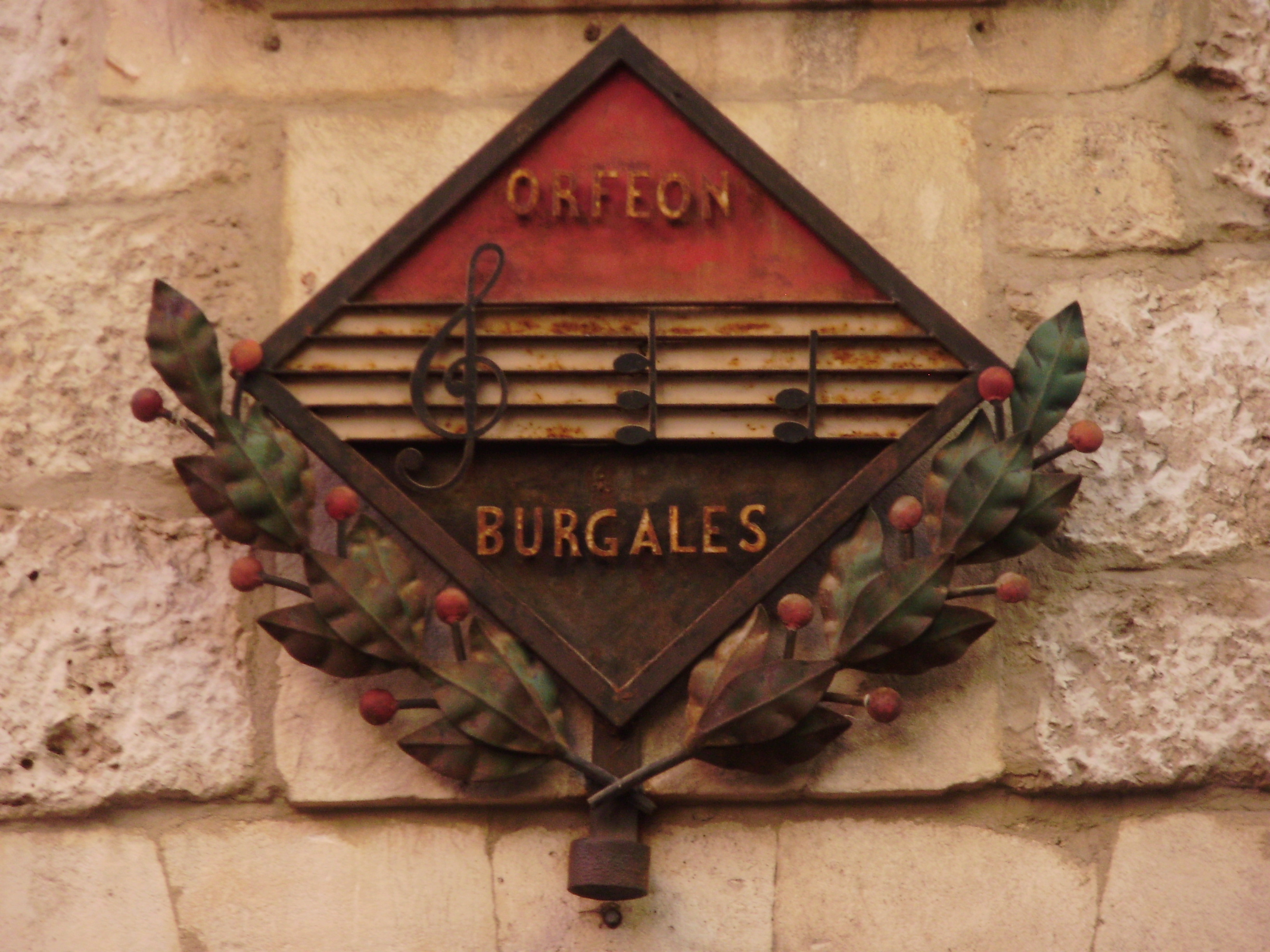 Imagen del emblema que hay en la puerta del Orfeón Burgalés